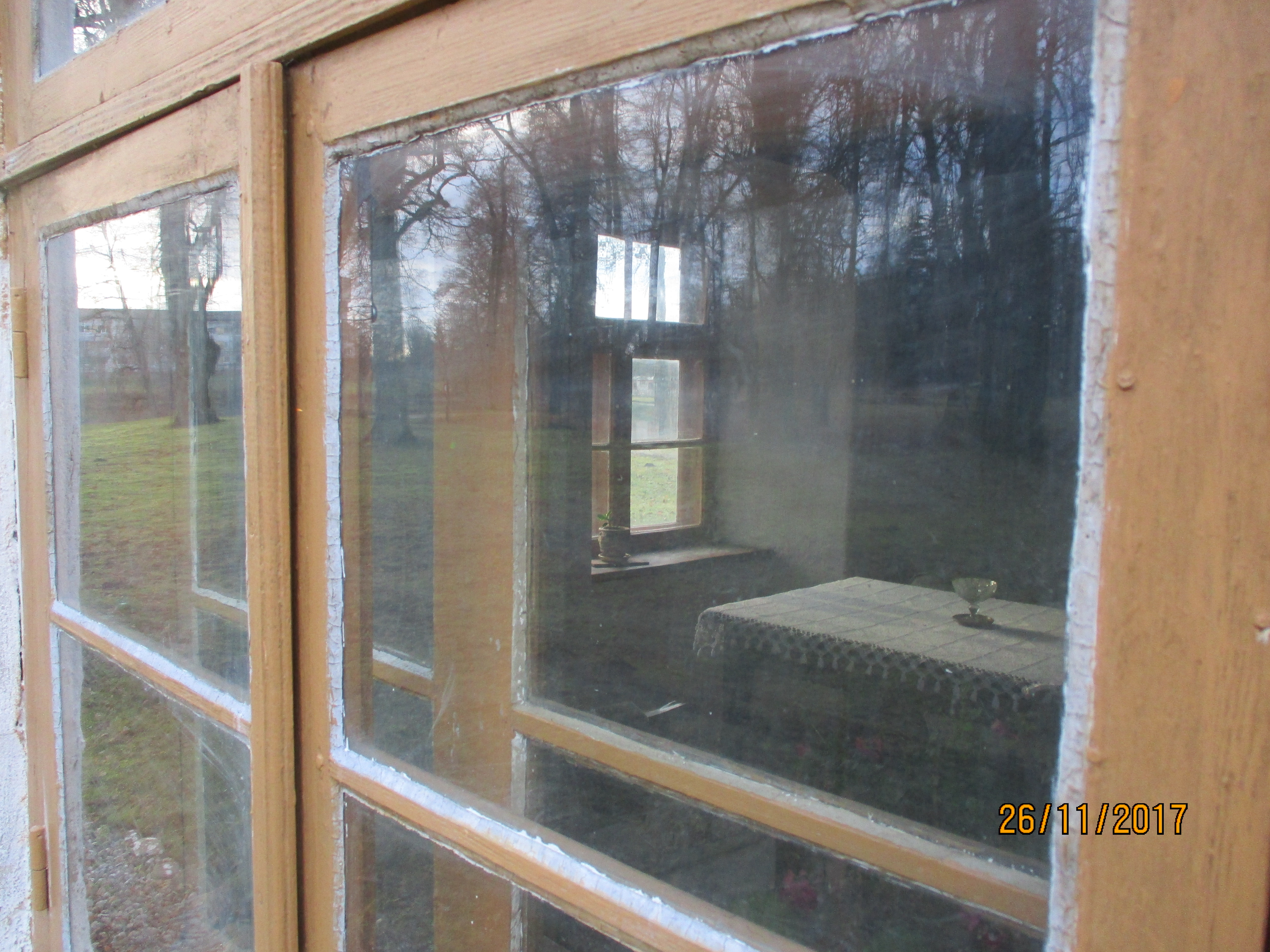 Majalinnuse kagukülje aken. Näha on, et linnuse seinapaksus on üle 1 meetri.